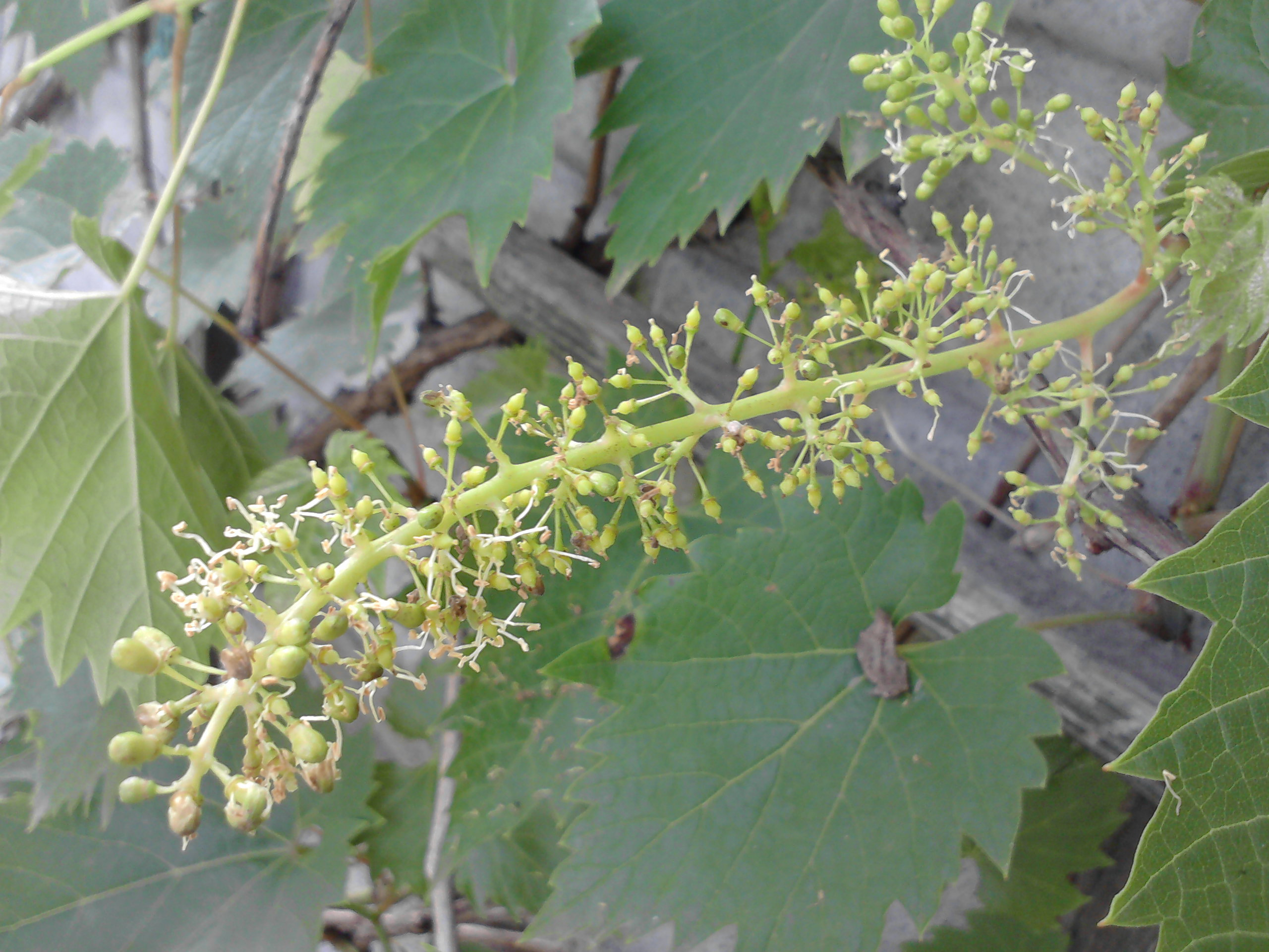 Kwiatostan winogronu